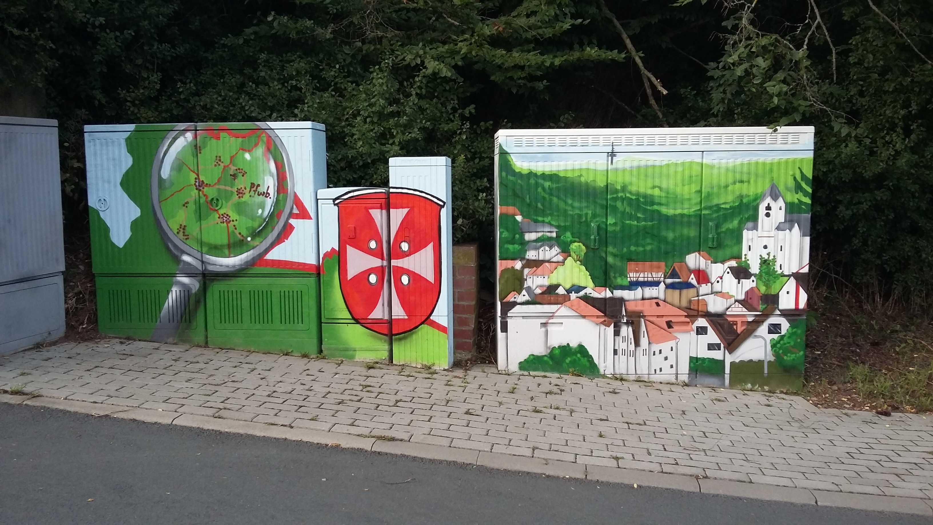 Pfaffenwiesbach im Grafitti (zum Dorfjubiläum 2017)